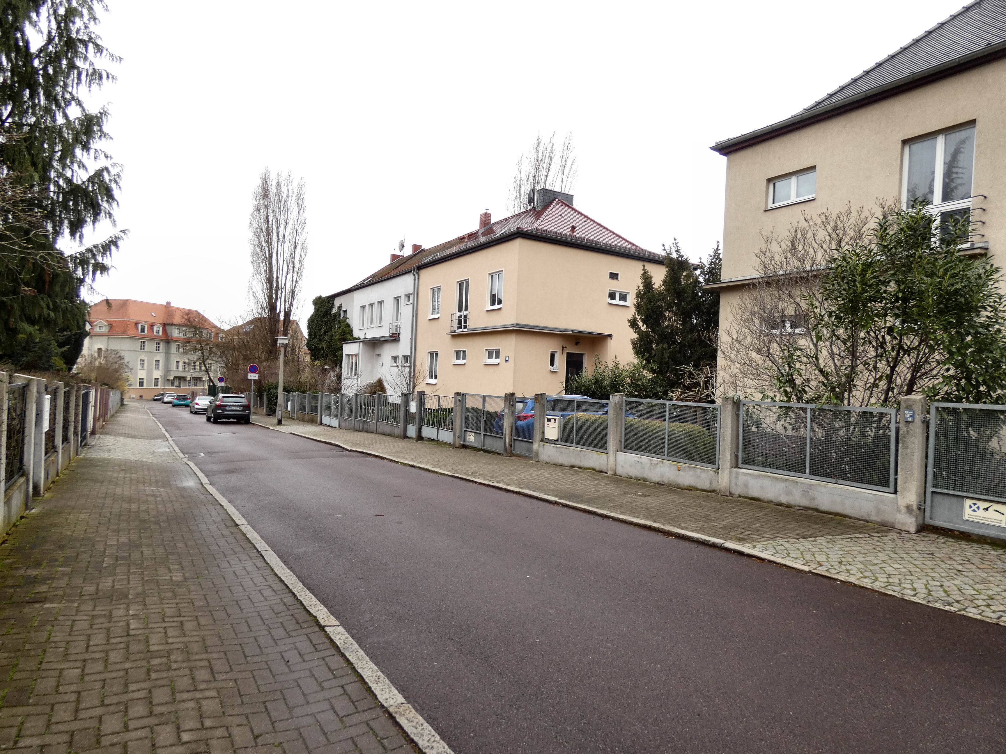 Steffensstraße in Halle (Saale)